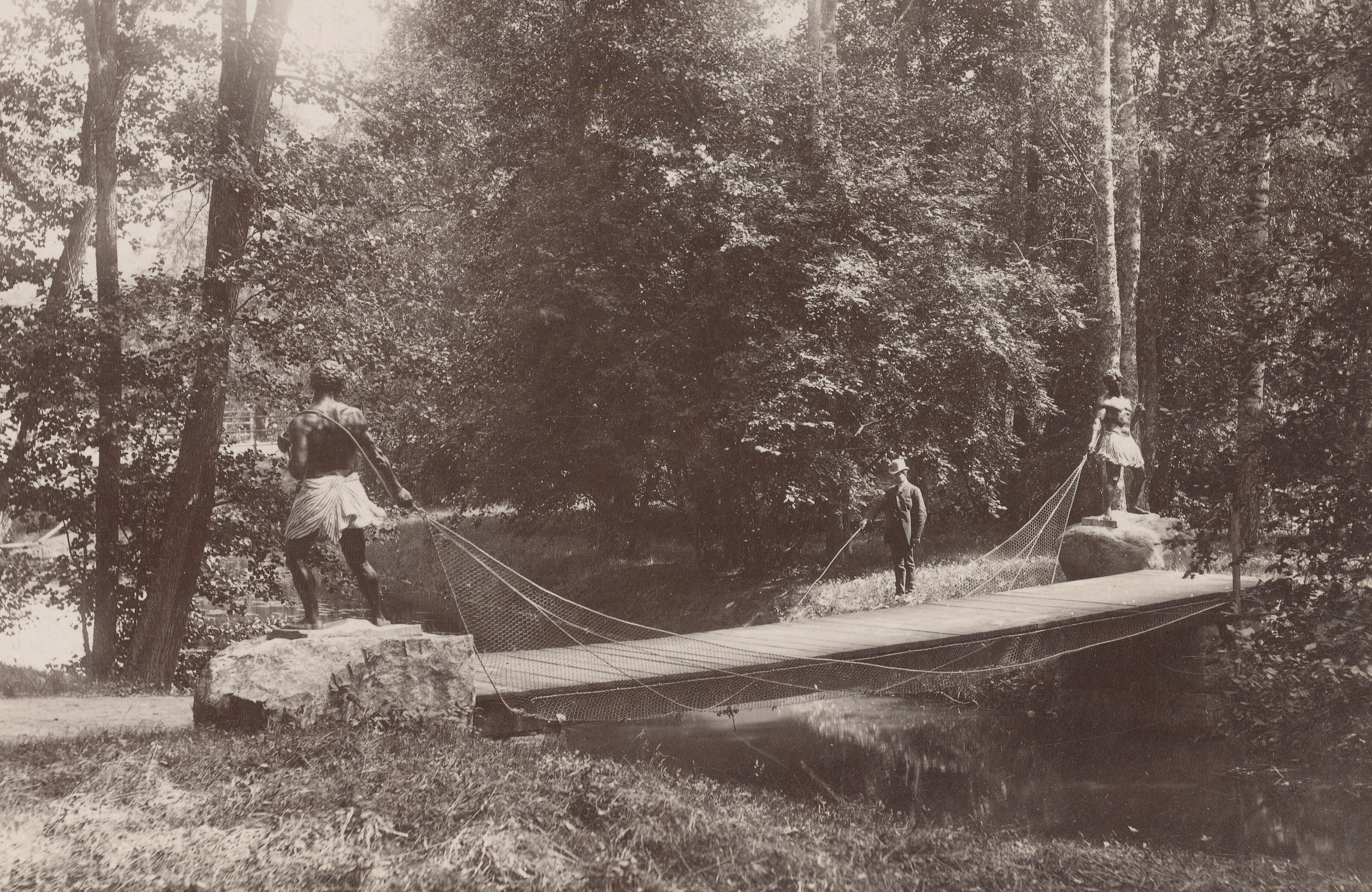 Ulriksdal - Nätdragande morianer kallad "Morianbron"